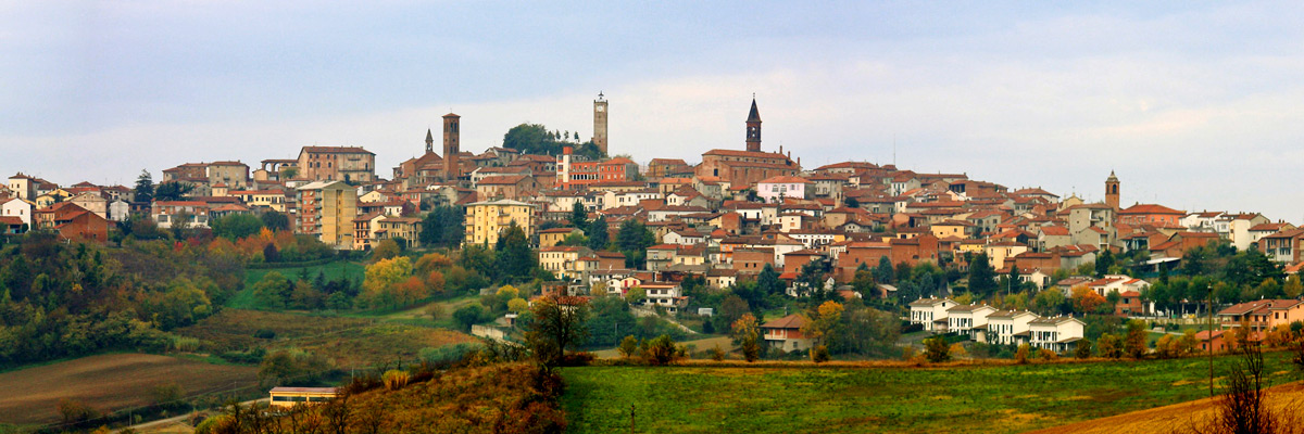 Panorama di Lu (AL)